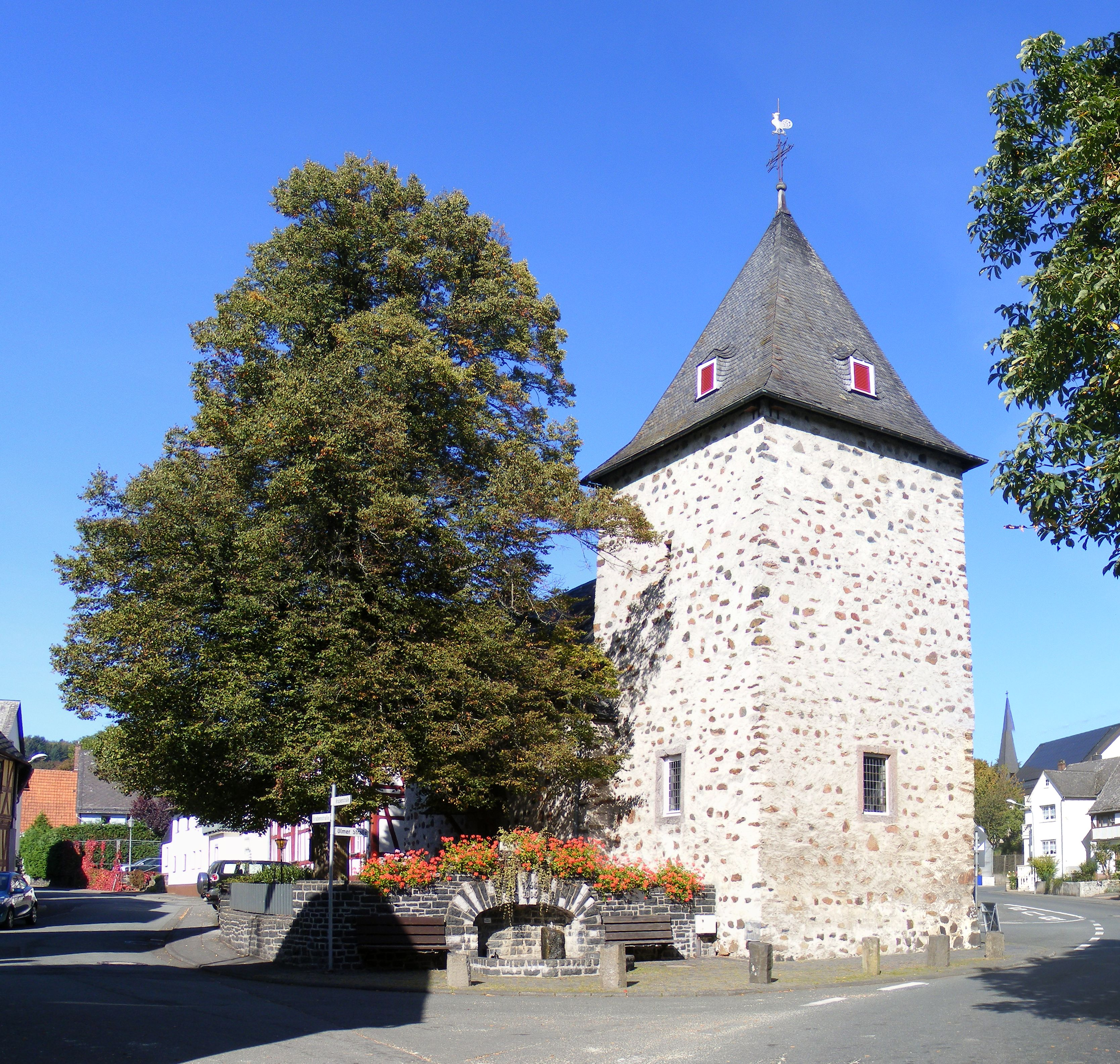 Evangelische Kirche in Allendorf (Greifenstein) Brunnenstraße 2